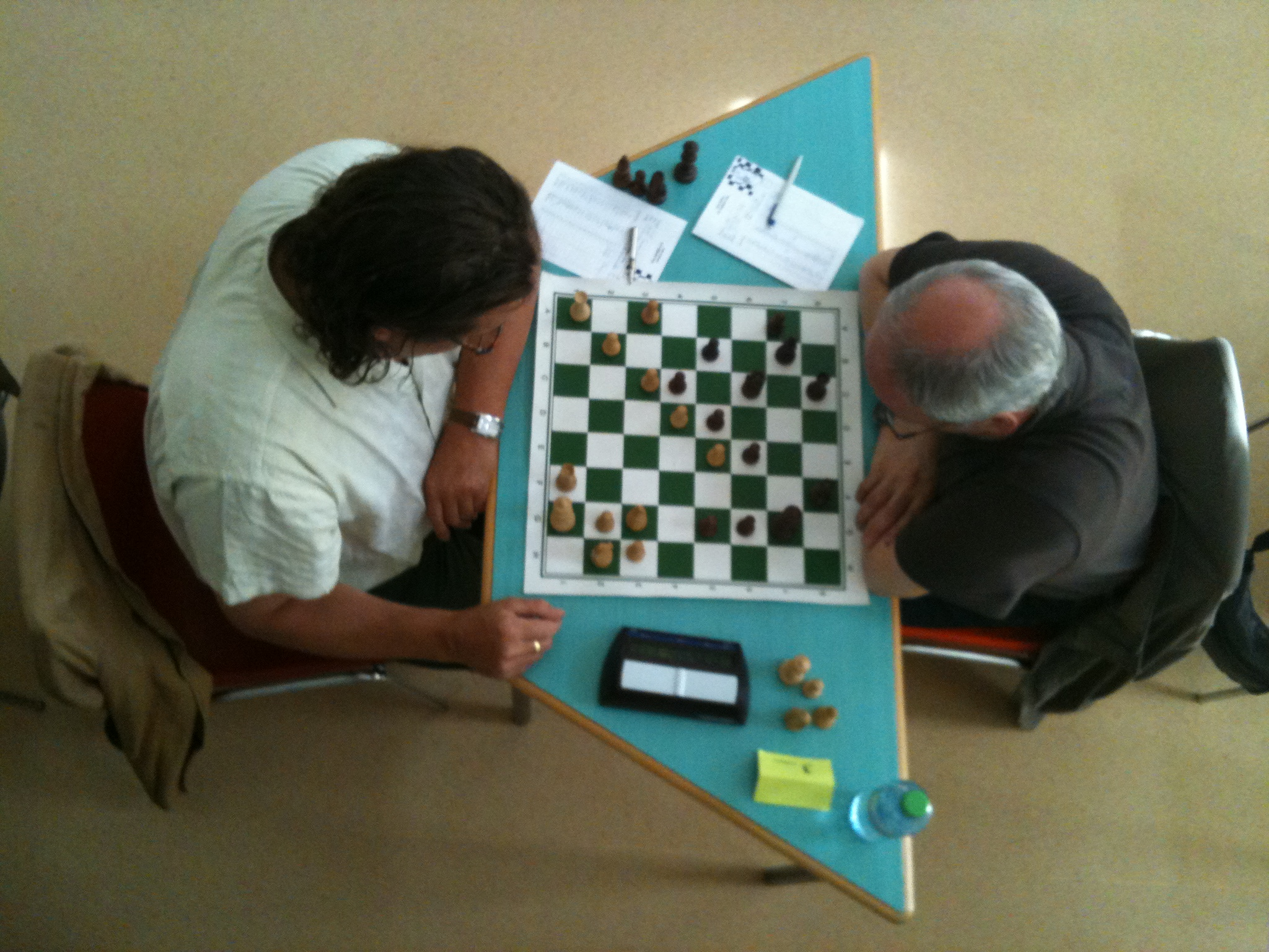 Club des Cavaliers Fous Championnat Suisse d'Echecs / Geneva